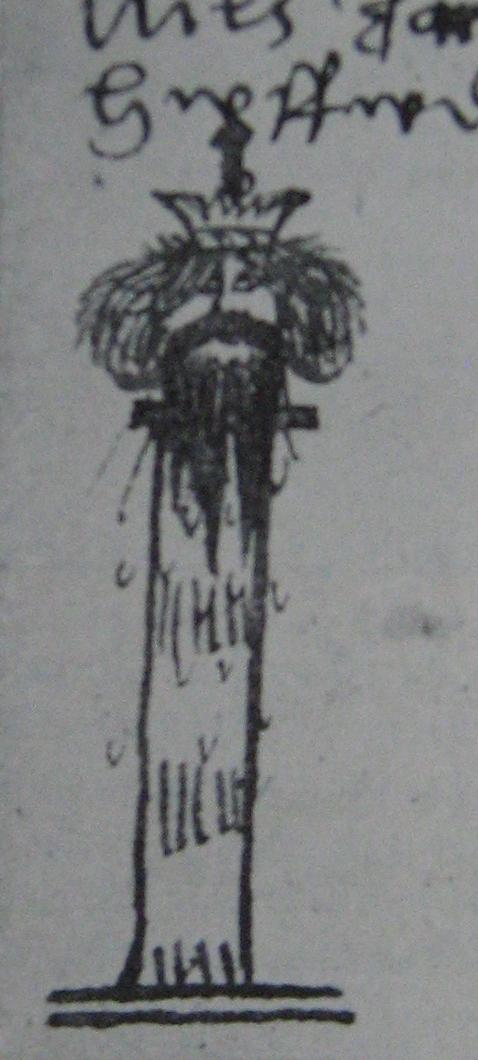 Nils Dackes avhuggna huvud, uppspikat på en påle. Teckning ur Johan Petri Klints "Den swenska krönicka om Kongungh Göstaffs rigemente ifrån anno 1520 intill 1560".